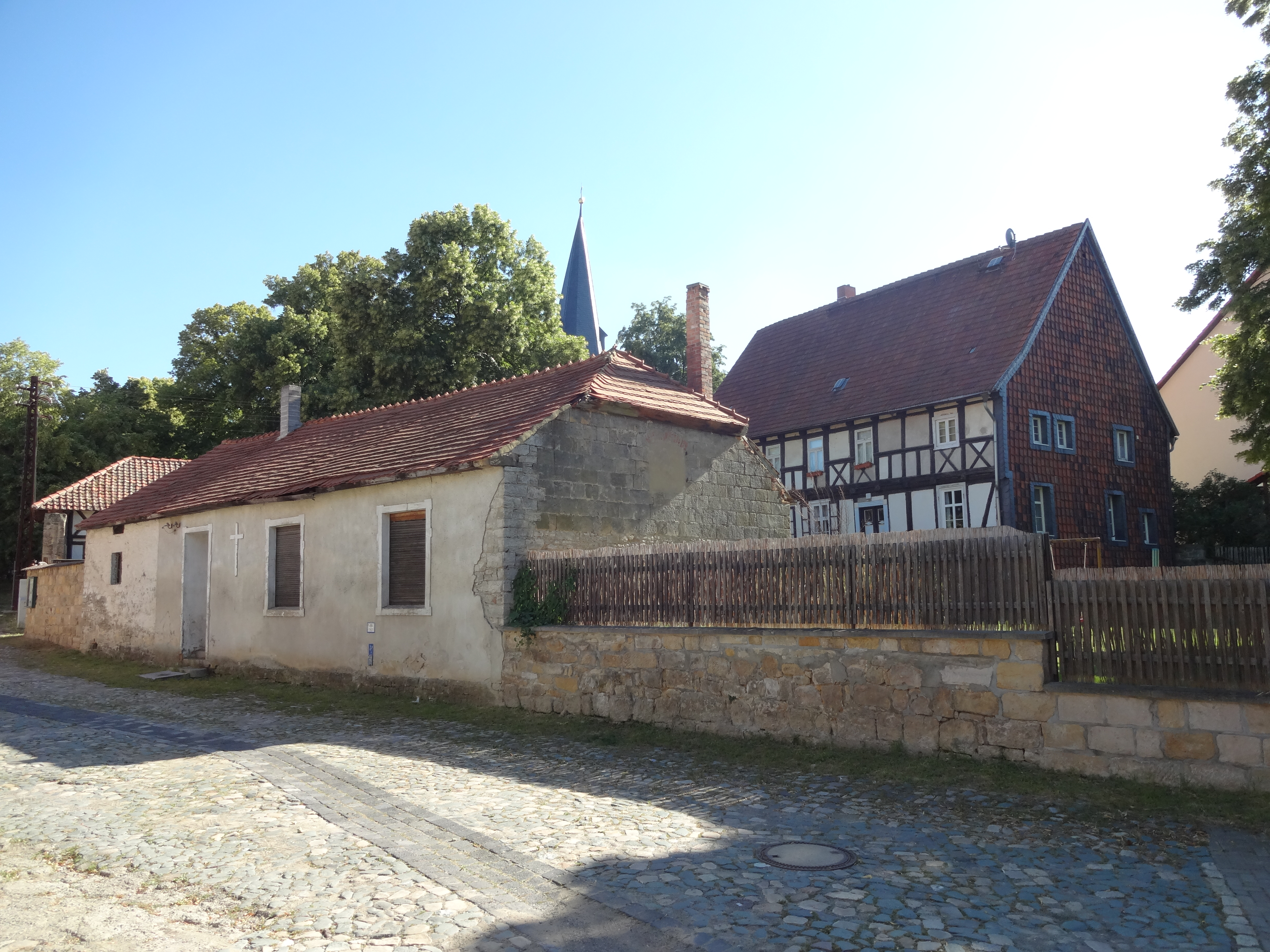 denkmalgeschützter Pfarrhof am Mittentor 7 in Harsleben